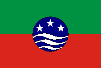 Bandeira de Itajá, Rio Grande do Norte, Brasil.